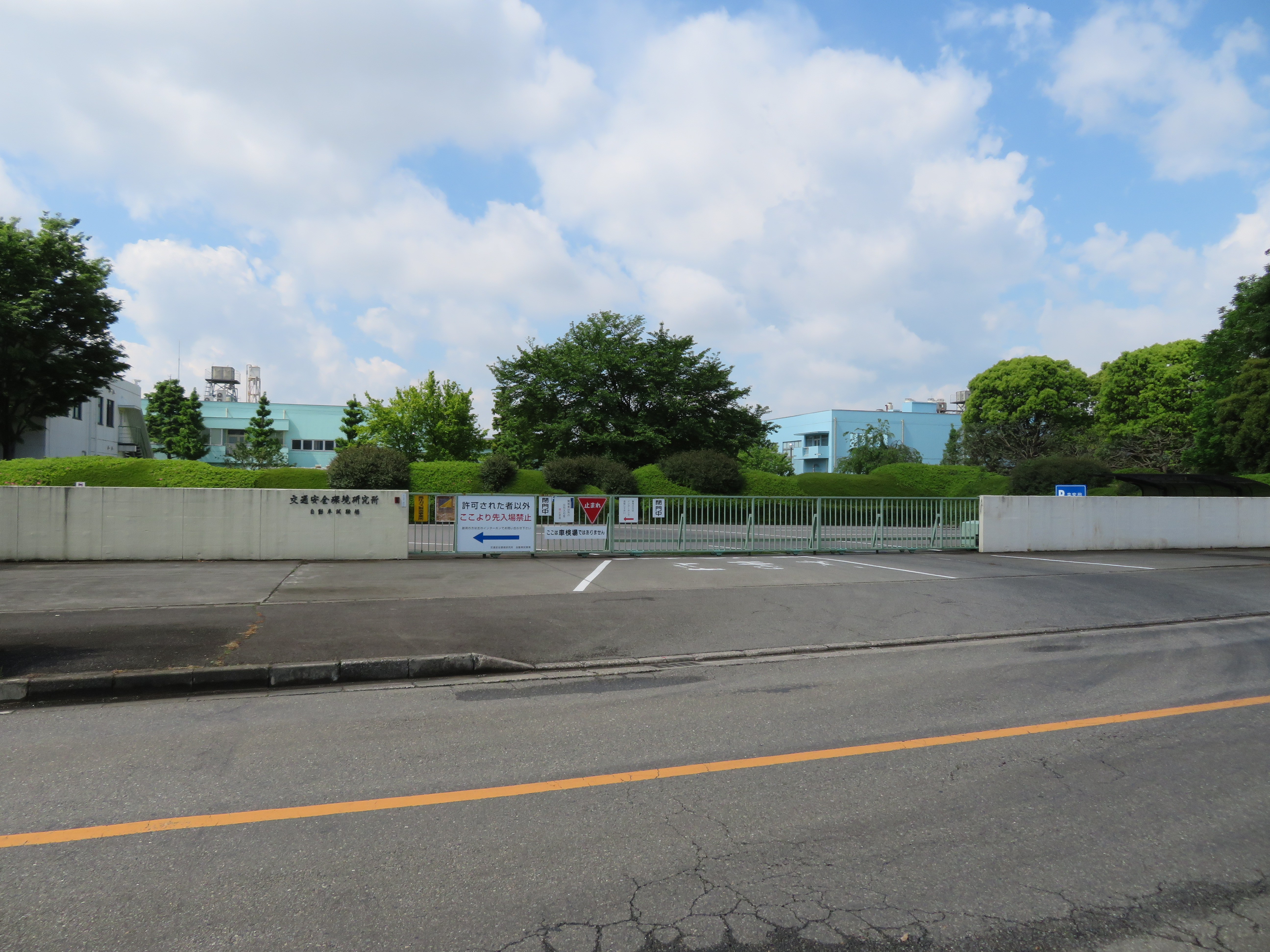 埼玉県熊谷市に所在する 独立行政法人交通安全環境研究所自動車試験場 Canon PowerShot SX720 HS